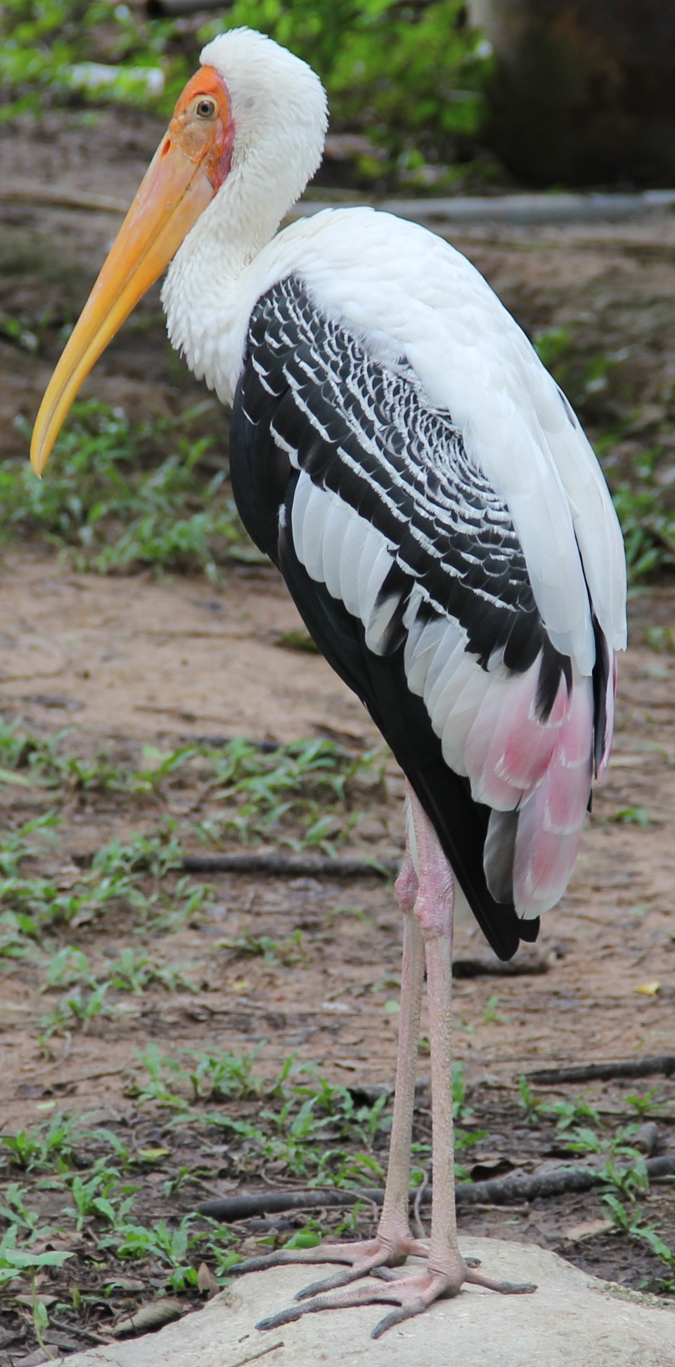 Hình chụp bằng máy ảnh kỷ thuật số một con chim của Việt Nam được trưng bày tại Khu du lịch Đại Nam